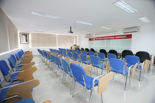 Một trong các giảng đường của SIU